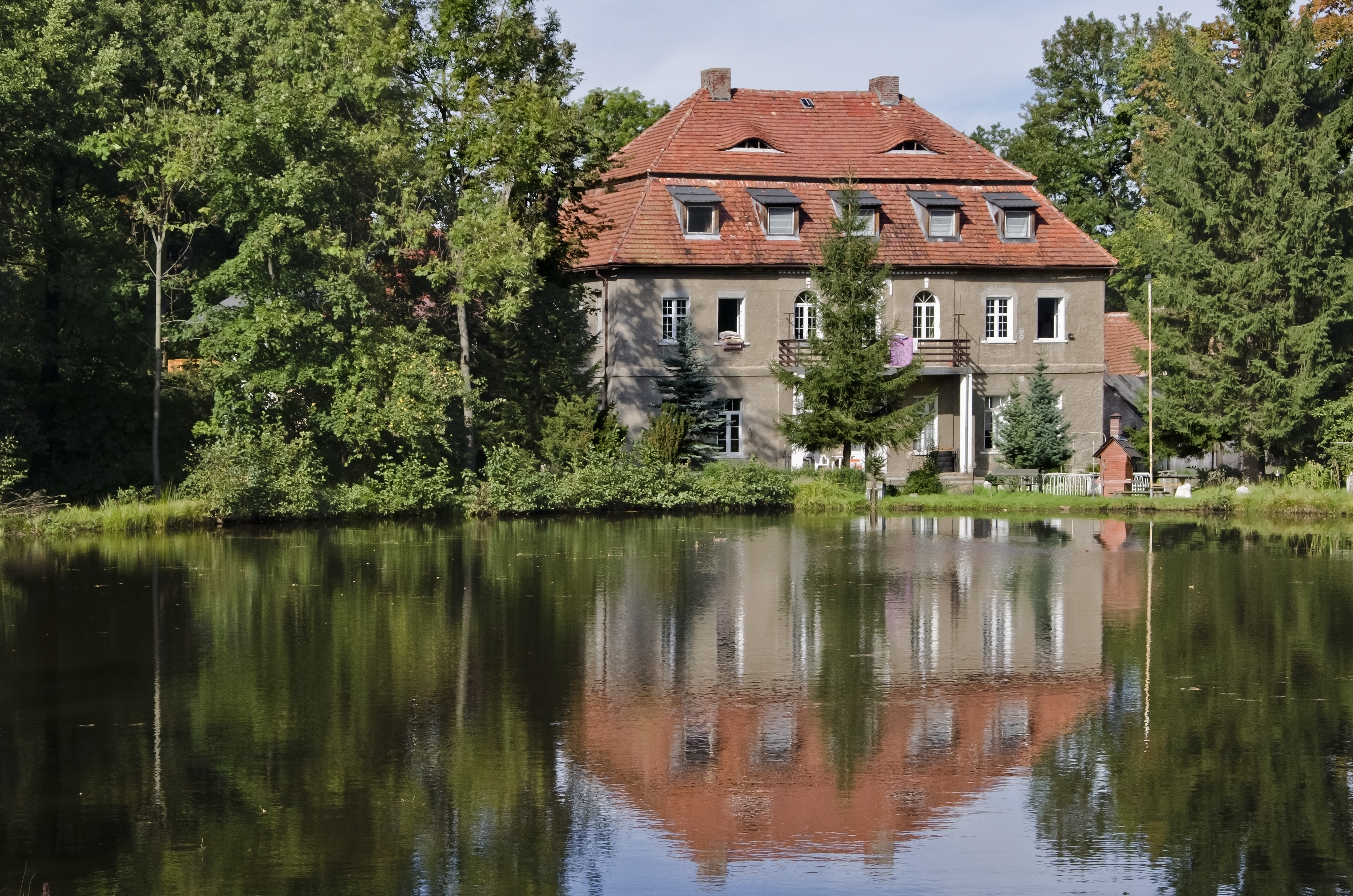 Pałac w Ciszycy od strony południowej. Kowary.